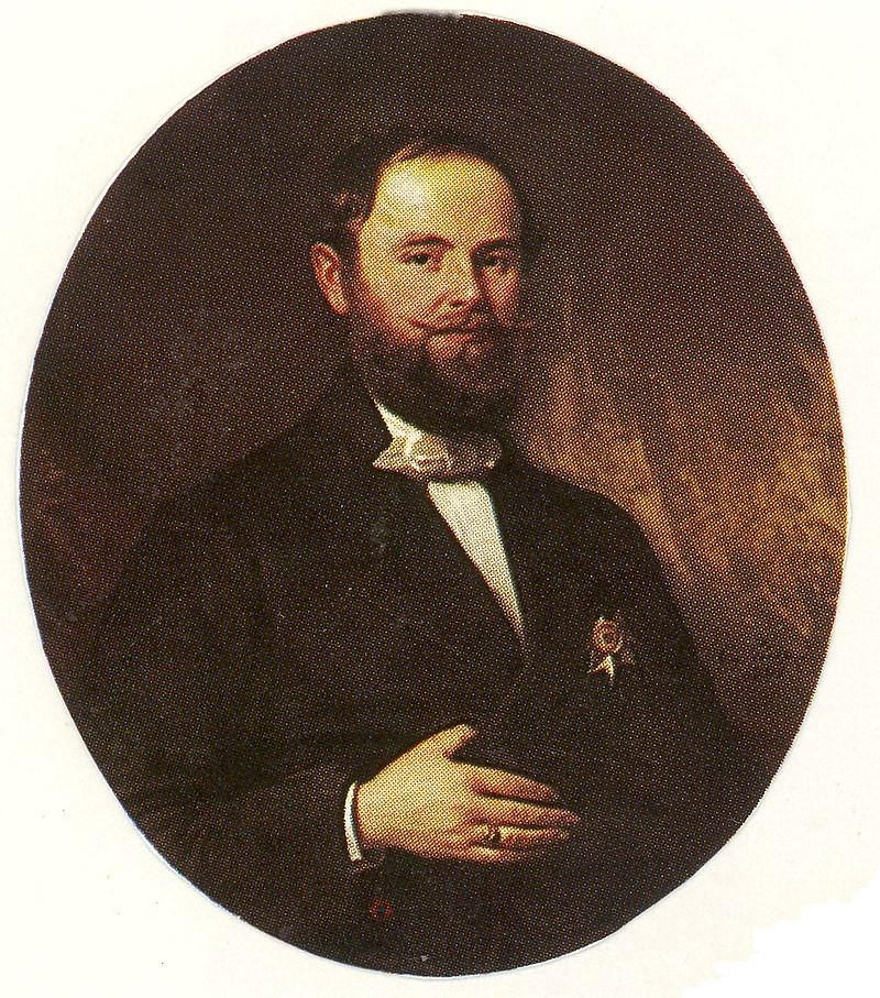 Fürst Georg Viktor zu Waldeck und Pyrmont